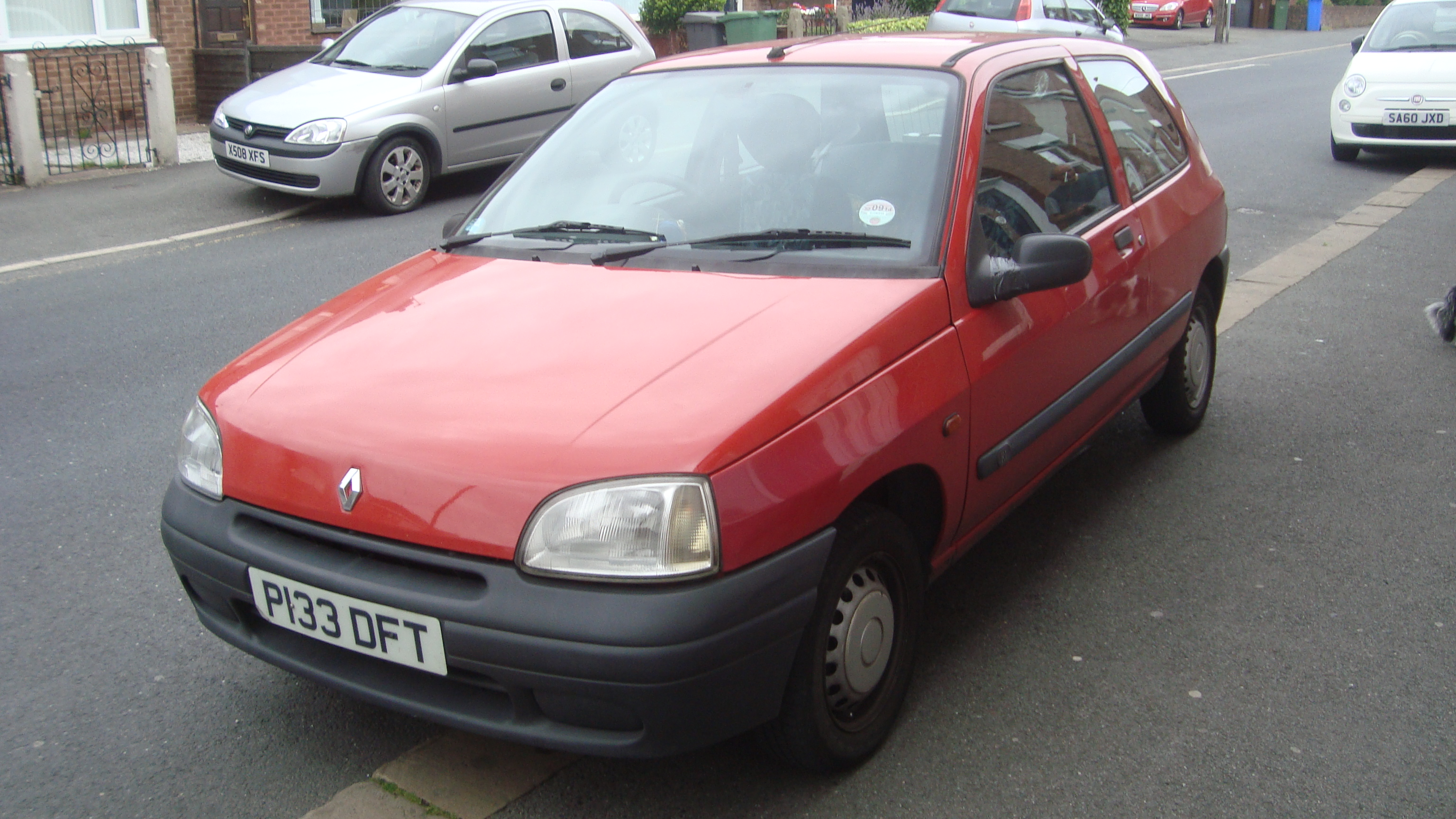 1997 Renault Clio 1.1 RL Paris